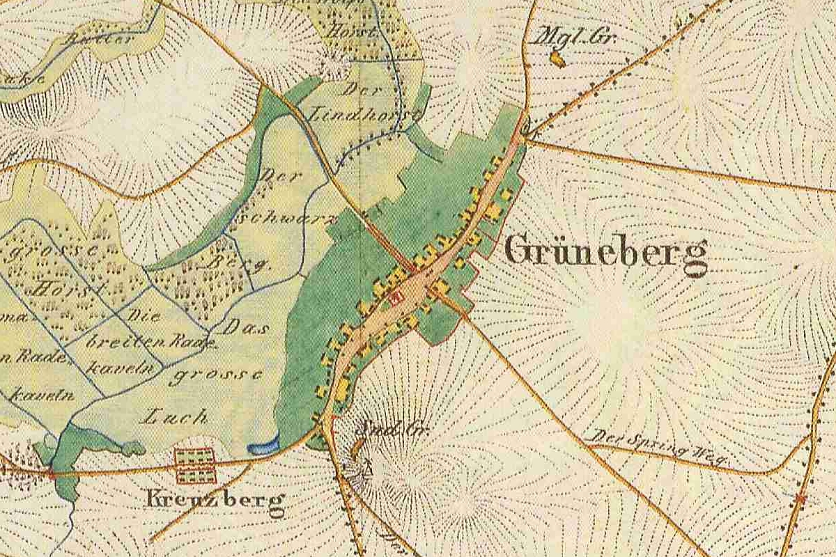 Karte von Grüneberg, Kreis Ruppin, Provinz Brandenburg, 1840